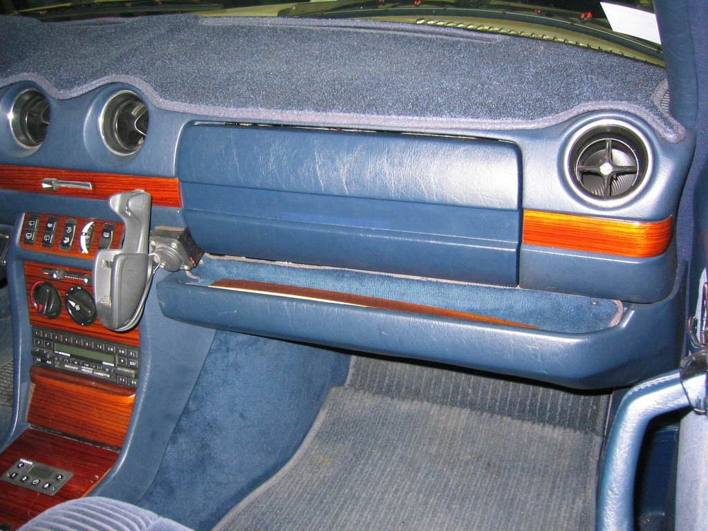 Beifahrerairbag Mercedes-Benz W123 aufgenommen auf der Techno Classica 2004 in Essen.